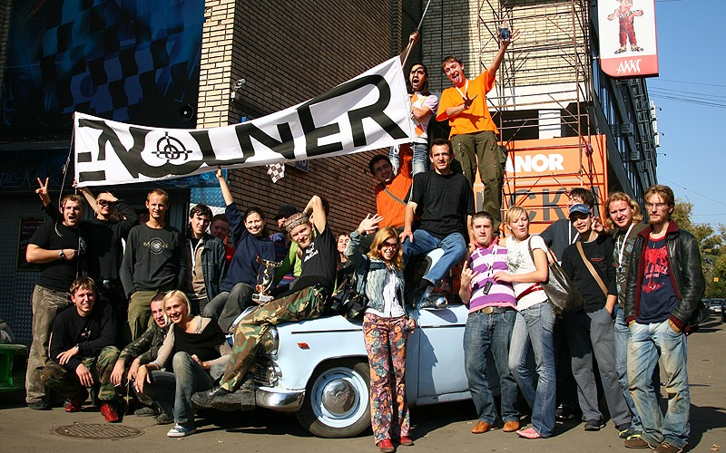 фотография с игры